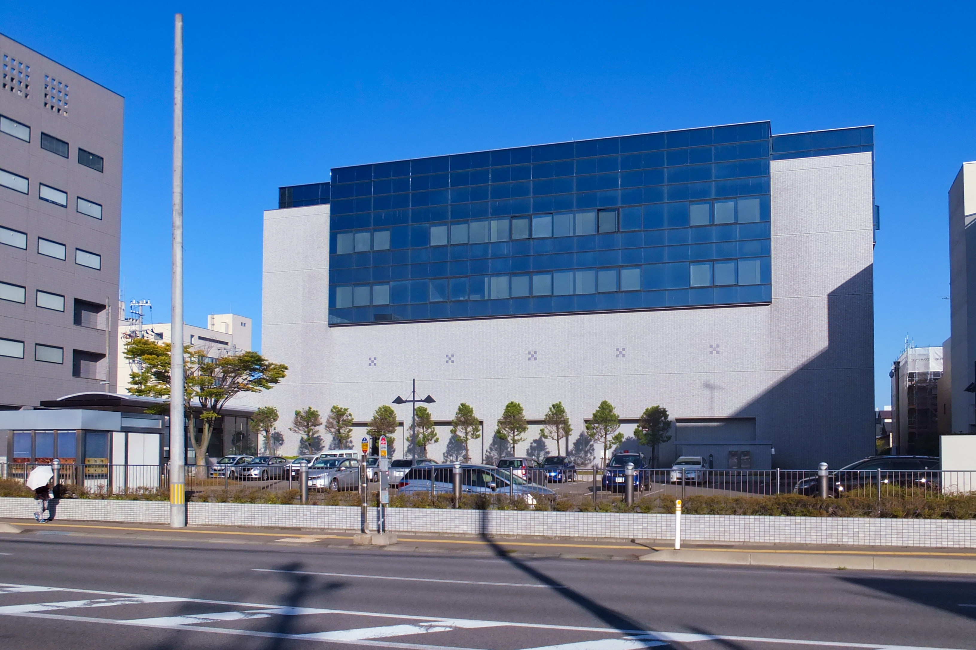 北都銀行旭北事務センター（秋田市旭北錦町）